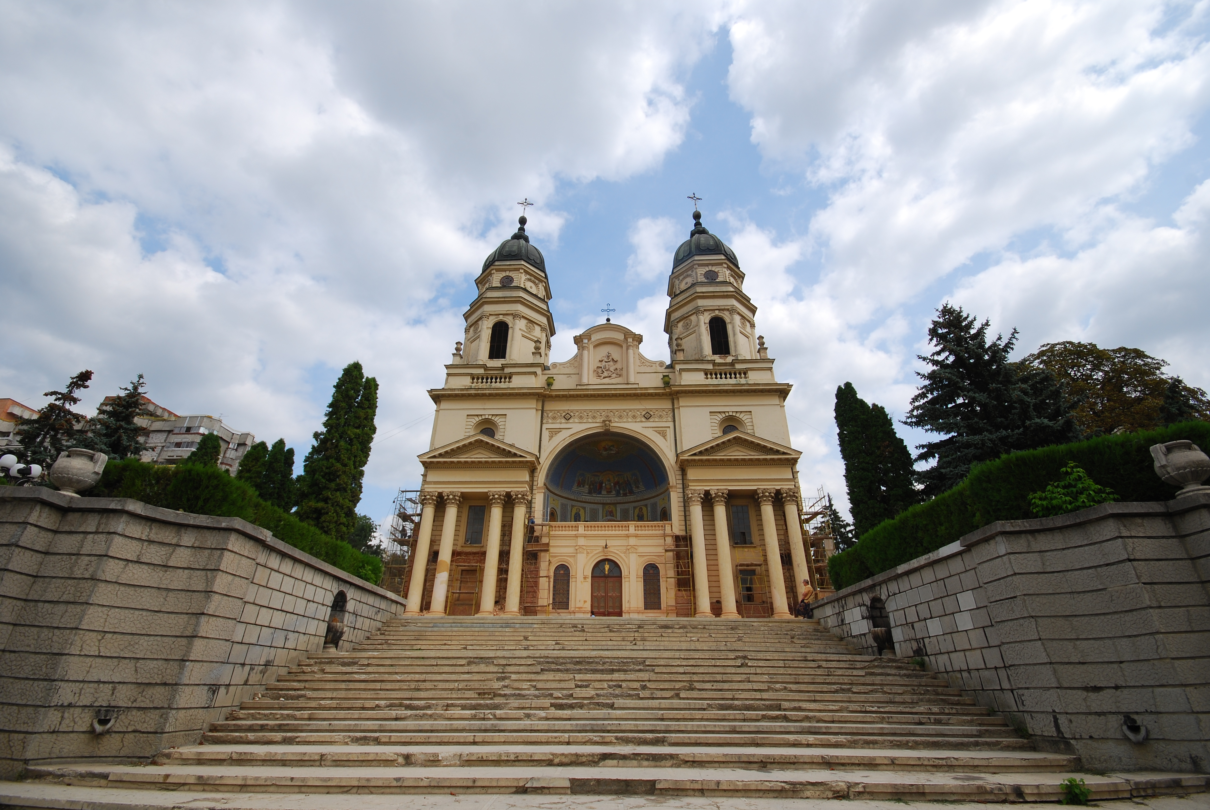 Catedrala "Sf. Gheorghe" și "Întâmpinarea Domnului" 01